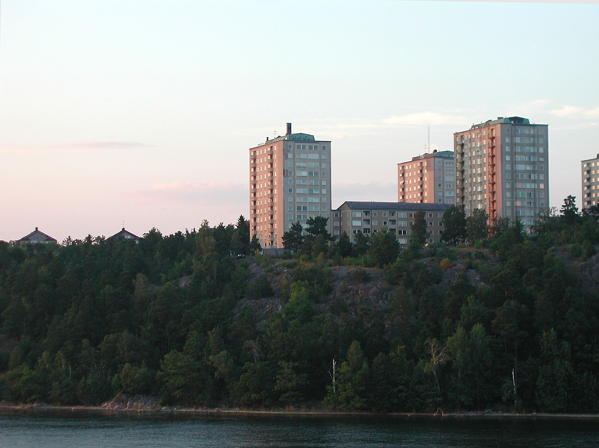 Höghusen på Fregattvägen Lidingö, som ligger närmast Lilla Värtan.